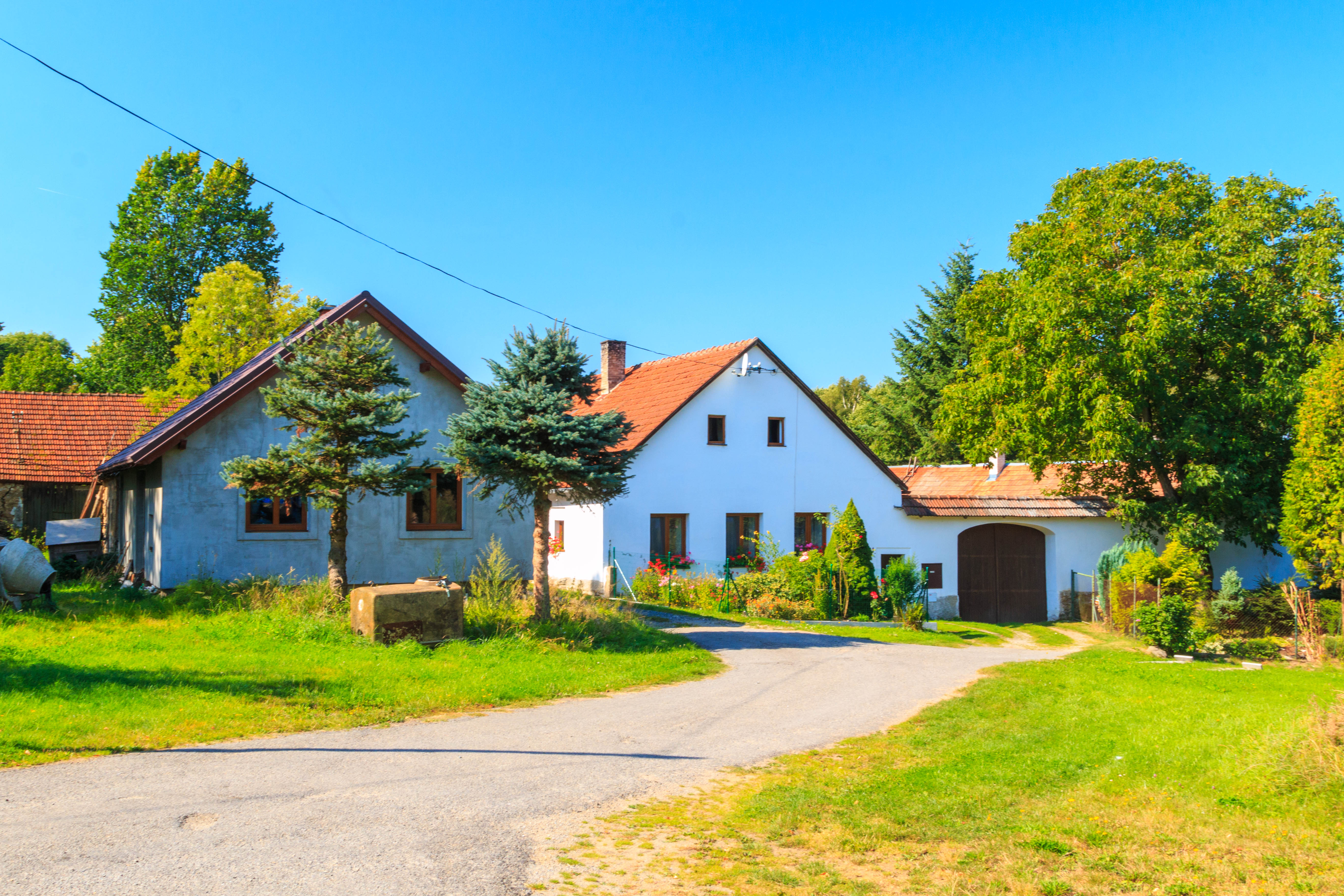 Holušice u Kaliště - čp. 2